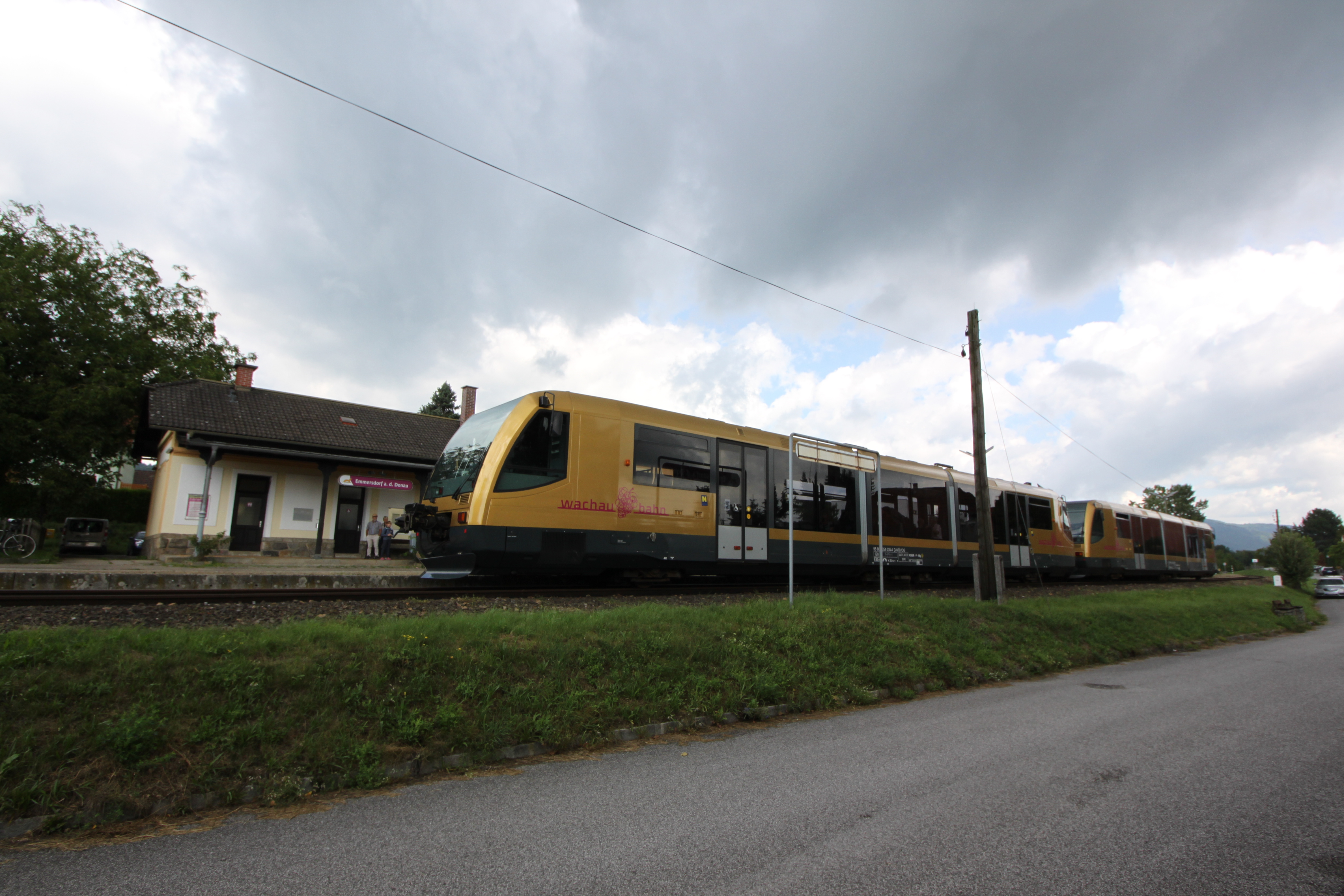 Bahnhof Emmersdorf an der Donau, die Wachaubahn steht im Endbahnhof